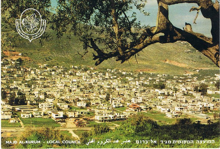 מג'ד אל כרום